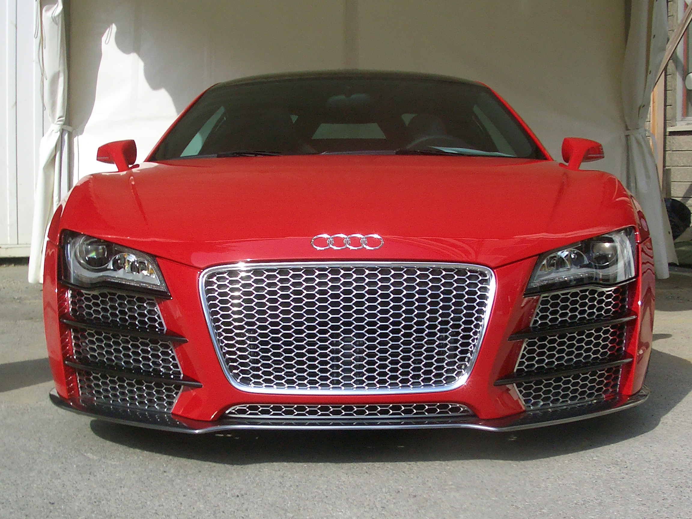 Audi R8 TDI Le Mans von vorne